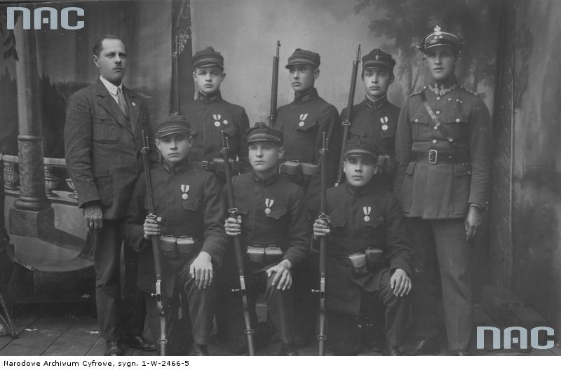 Беларуская (тарашкевіца): Групавы фатаздымак удзельнікаў пераможнай дружыны школьнага гуртку рамесьніцкай школы ў Пружане ў маршы камандамі на 6 км. Першы зьлева — кіраўнік гуртку Цясьлеўскі, першы справа — арганізатар спаборніцтваў паручнік Леан Гнатоўскі.